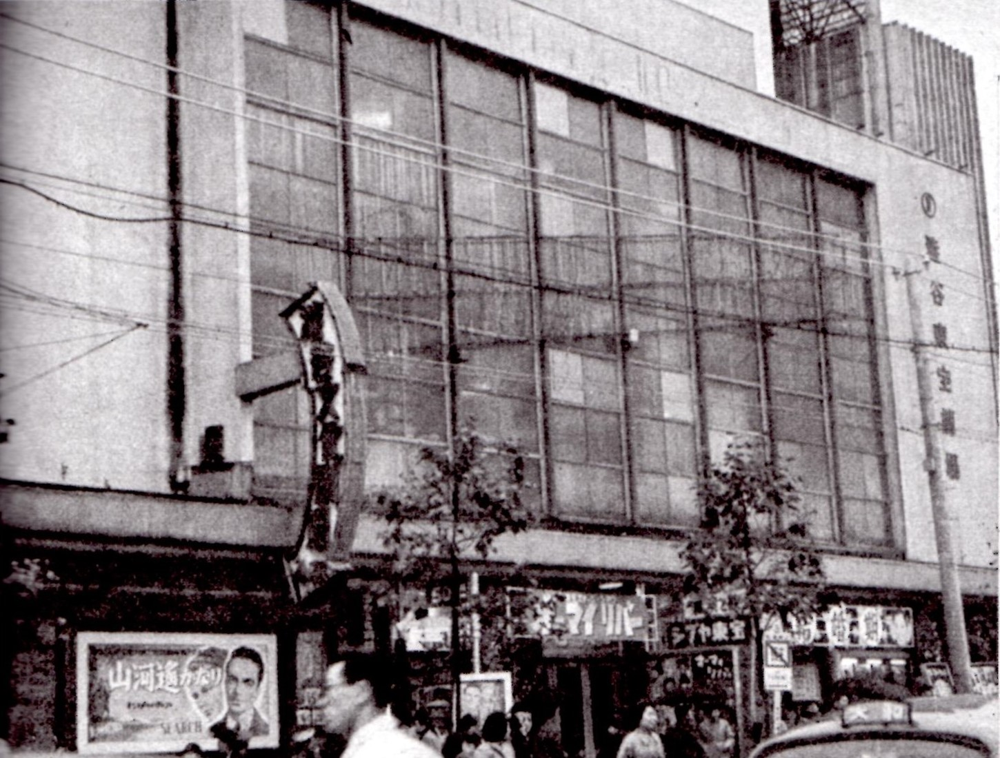 東京都渋谷区の映画館「渋谷東宝」。